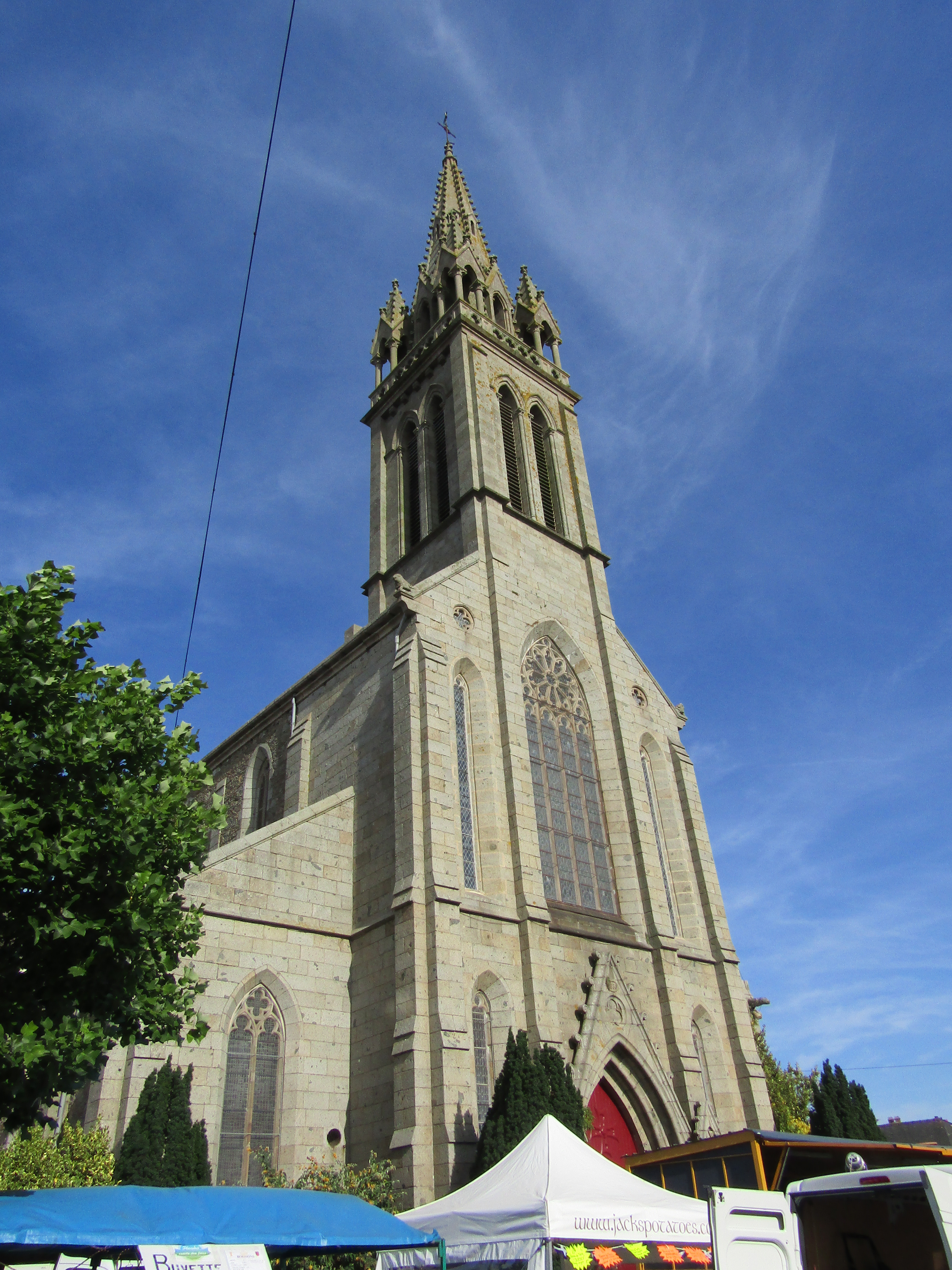 Eglise Saint-Pierre de Plouha